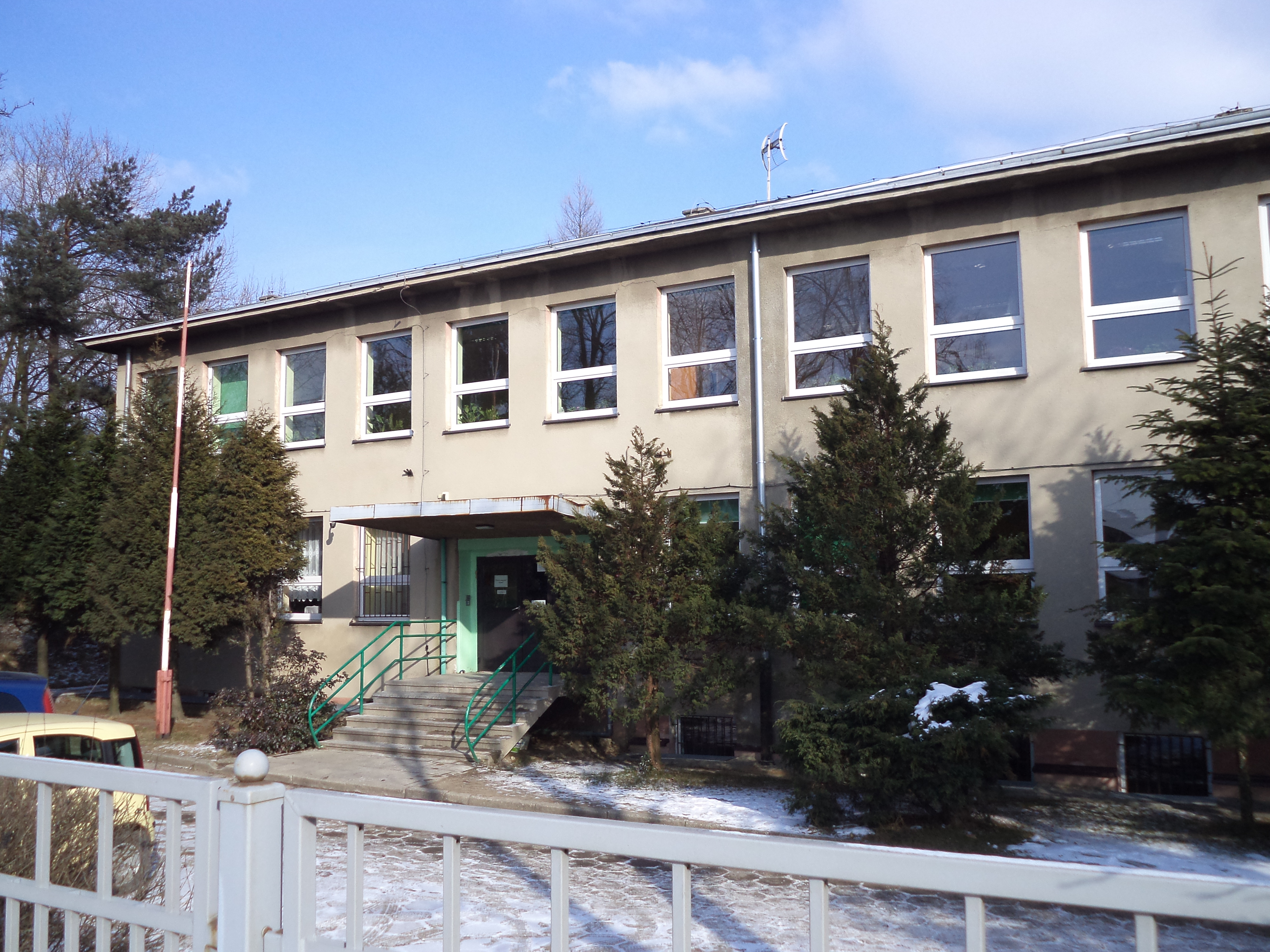 Budynek Szkoły Podstawowej nr 11 im. Władysława Broniewskiego w Tarnowskich Górach-Bobrownikach Śląskich z 1962 roku